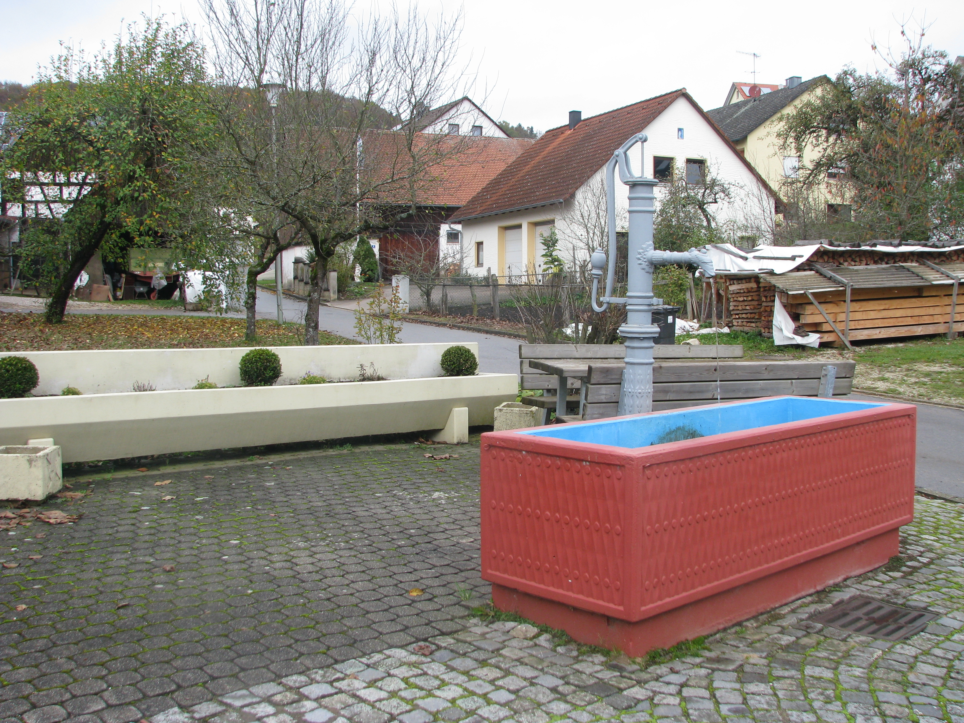 Unterrohrenstadt, Ortsteil der Gemeinde Berg bei Neumarkt in der Oberpfalz, Dorfbrunnen